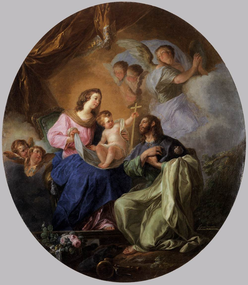 El lienzo muestra a la Virgen María y al Niño Jesús junto al apóstol Santiago el Mayor.